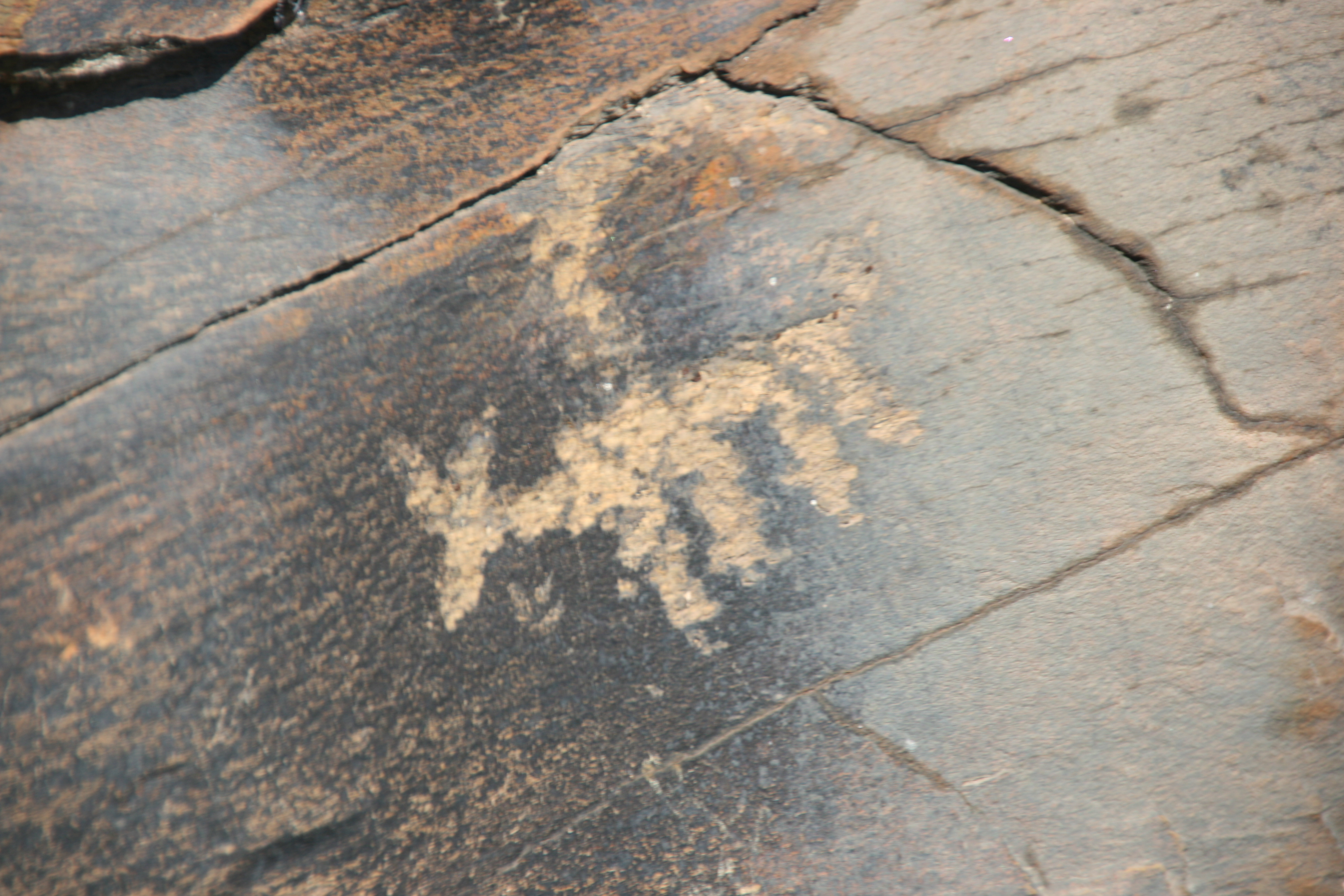 Estación de arte rupestre al aire libre de Domingo García. En este yacimiento se han identificado grabados desde el Paleolítico hasta la era moderna.